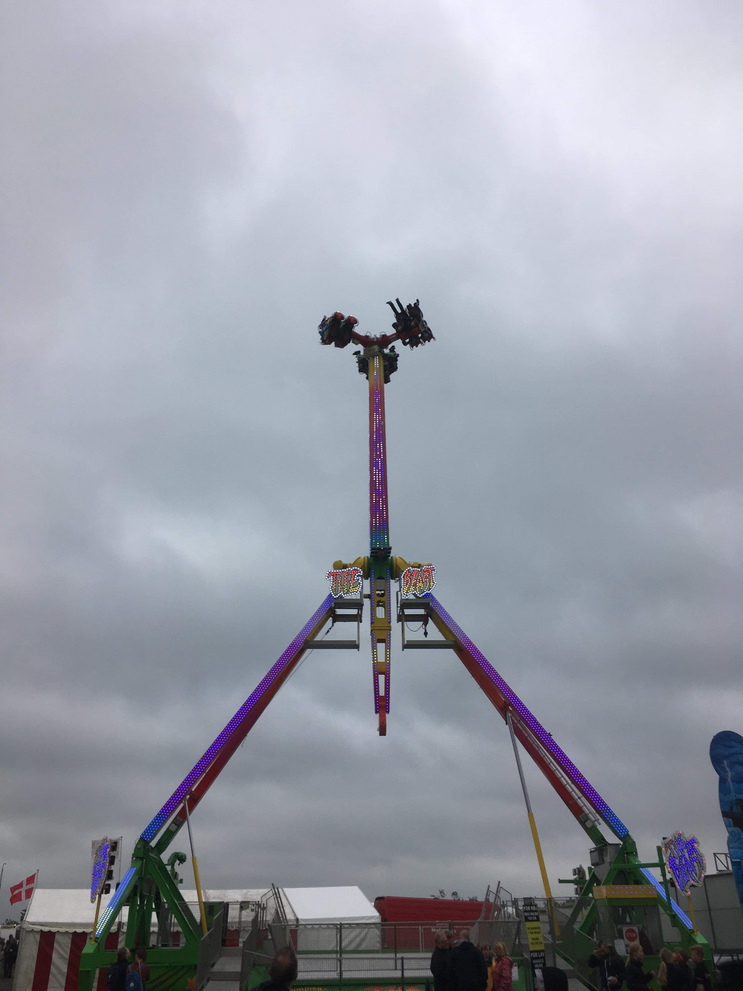 Nordisk Fun Fairs “The Beast” kendt som “Inversion”.